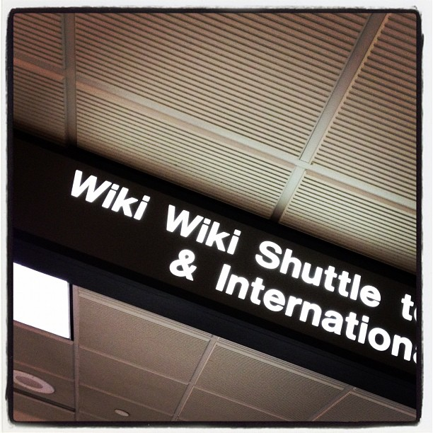 Wiki Wiki Shuttle tour sign